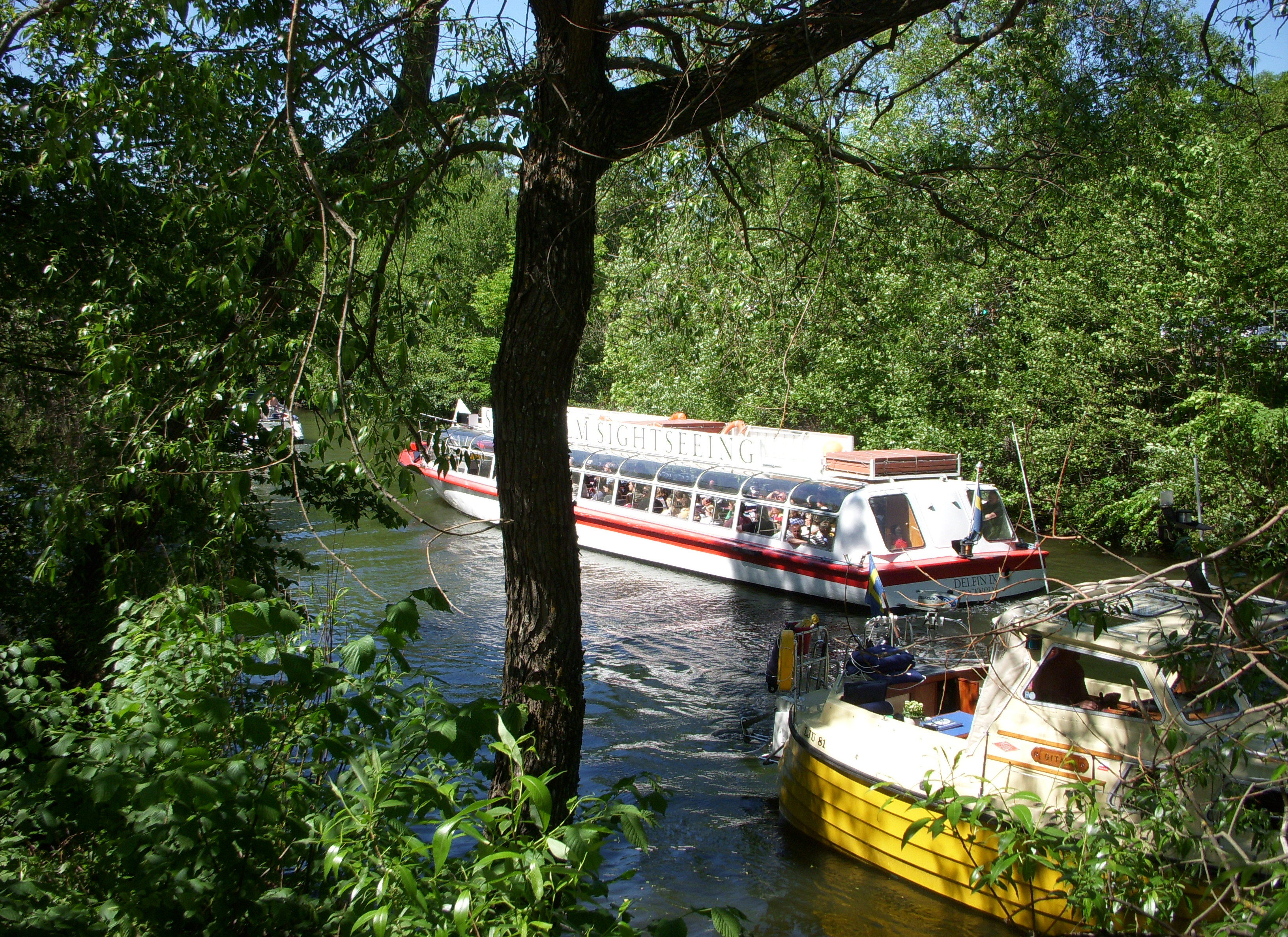 Karlbergskanalen